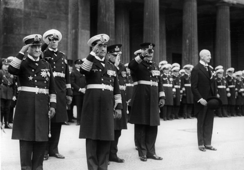 Berlin, Skagerraktag, Erich Raeder Skagerraktag am 31. Mai 1935 in Berlin, vor dem Ehrenmal Unter den Linden; Mitte: Admiral Erich Raeder Links: Admiral Wilhelm Souchon Abgebildete Personen: Raeder, Erich: Großadmiral, Oberbefehlshaber der Kriegsmarine, Deutschland (GND 118743511) Souchon, Wilhelm: Admiral i. R.